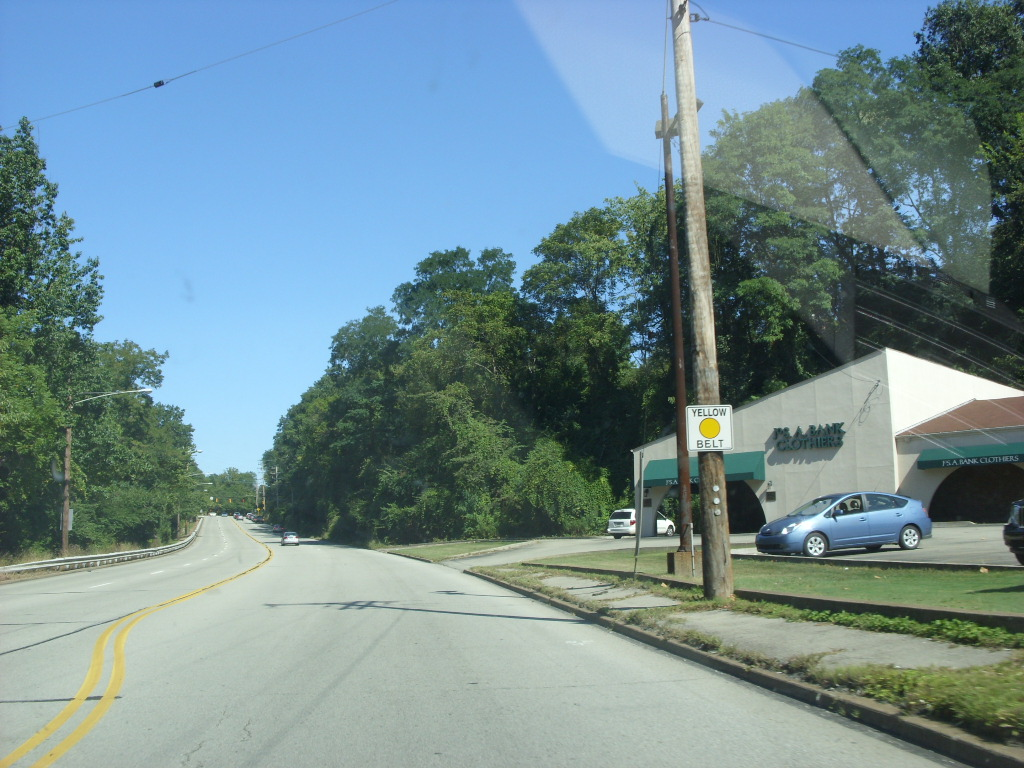 Allegheny County Belt Route System - Pennsylvania